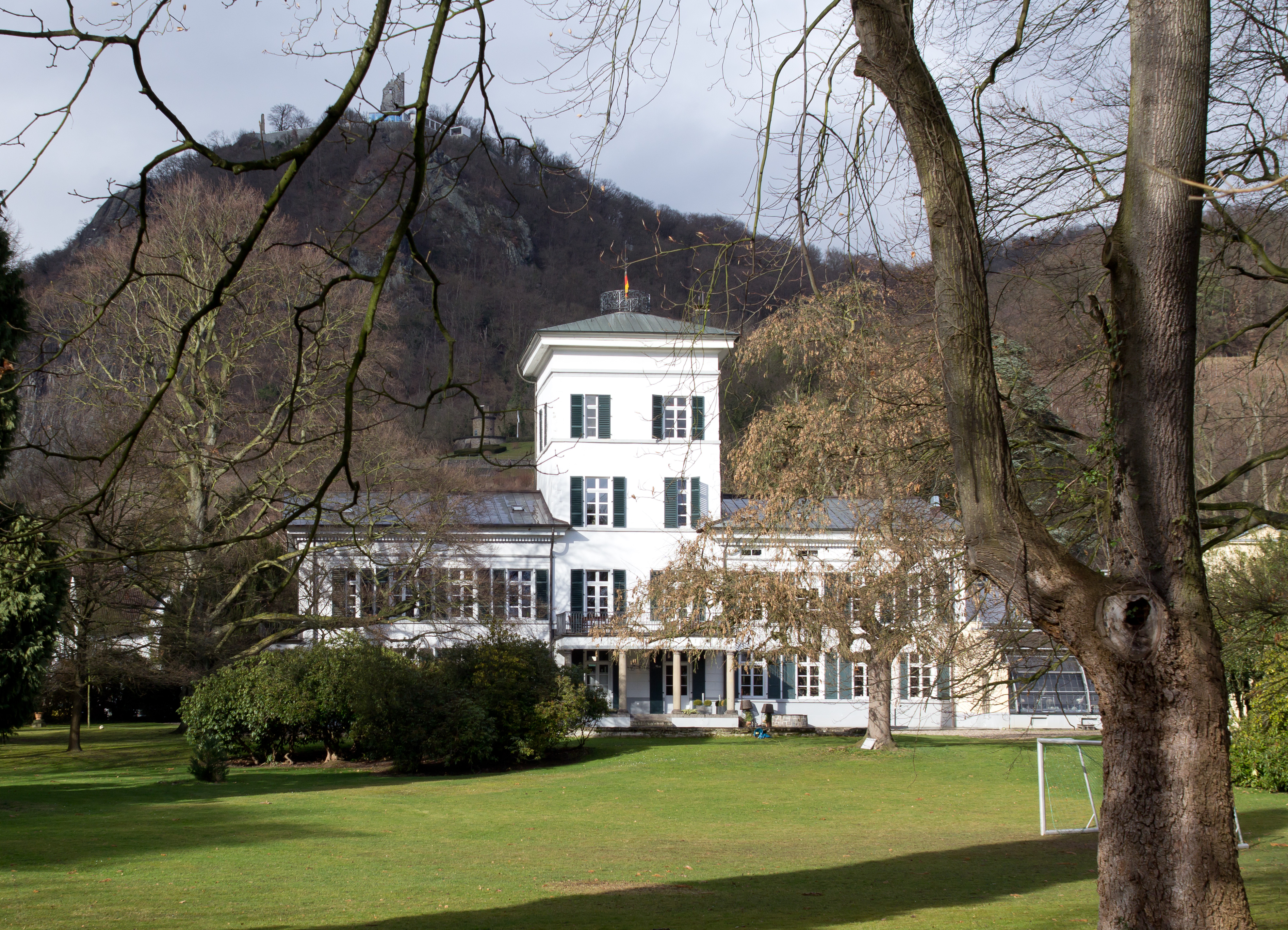 Haus im Turm mit Park, auch: Villa Merkens, im Hintergrund Drachenfels